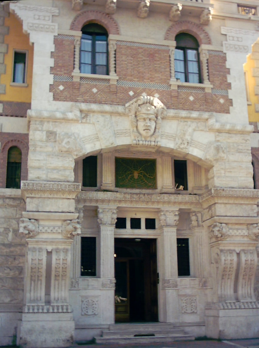 Portone del Palazzo del ragno - coppedè